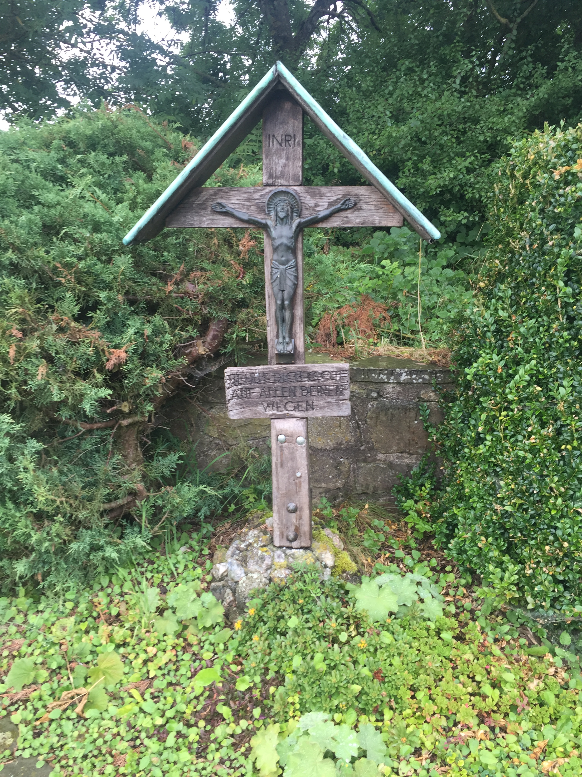 Crucifijo junto al camino.